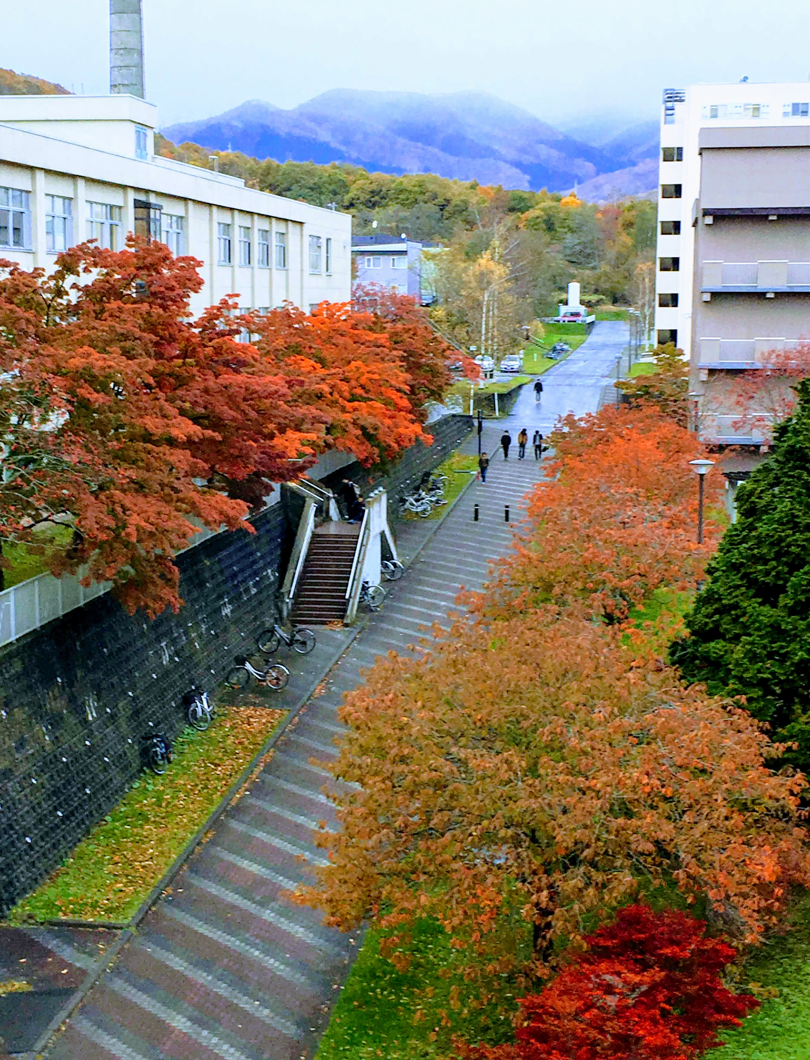 室蘭工業大学キャンパス内